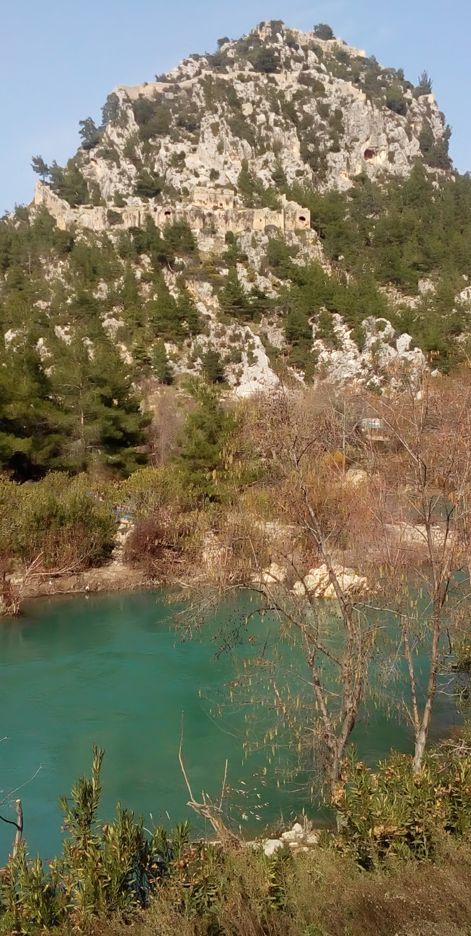 Alara Han (2018)